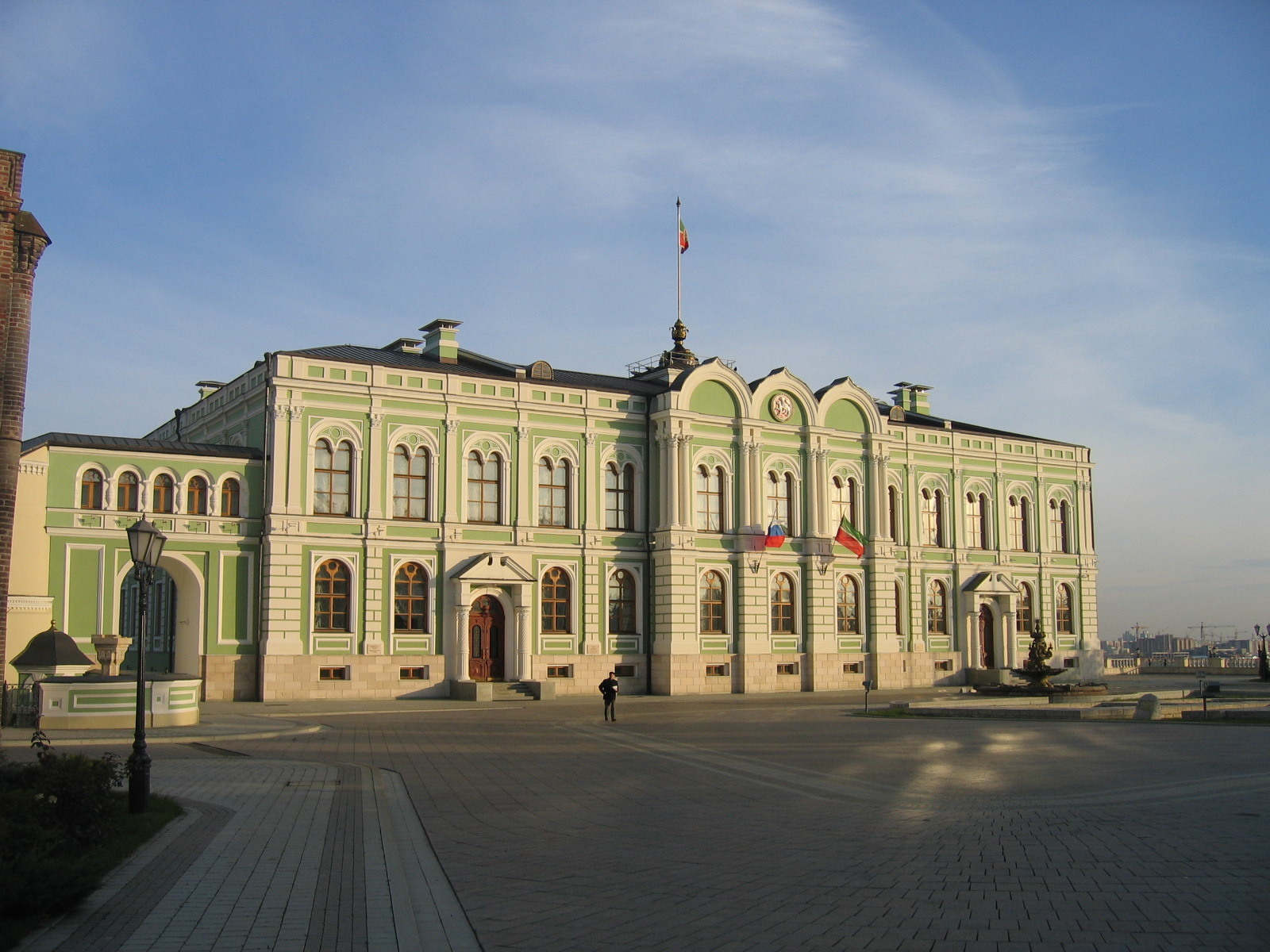 Tatarstan President's Palace, Kazan Kremlin